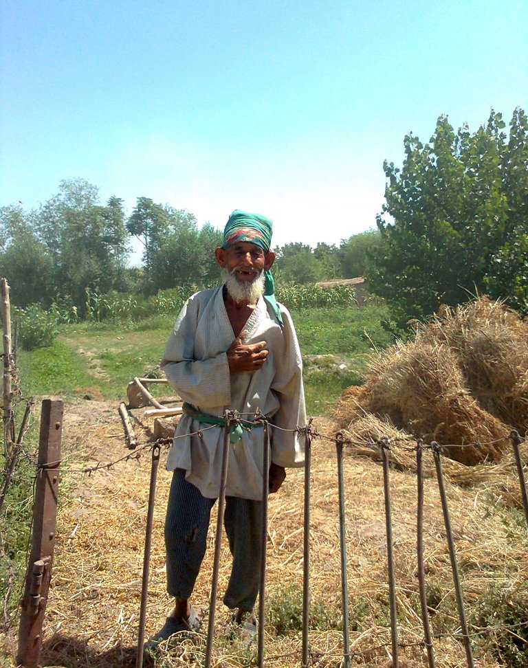 Мужчина преклонного возраста в Южной части Узбекистана (Кумкурганский район, Сурхандарьинской области)